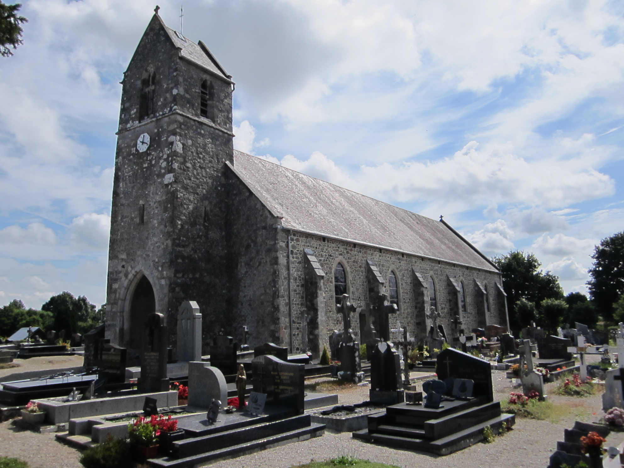 église Saint-Manvieu de Vaudrimesnil